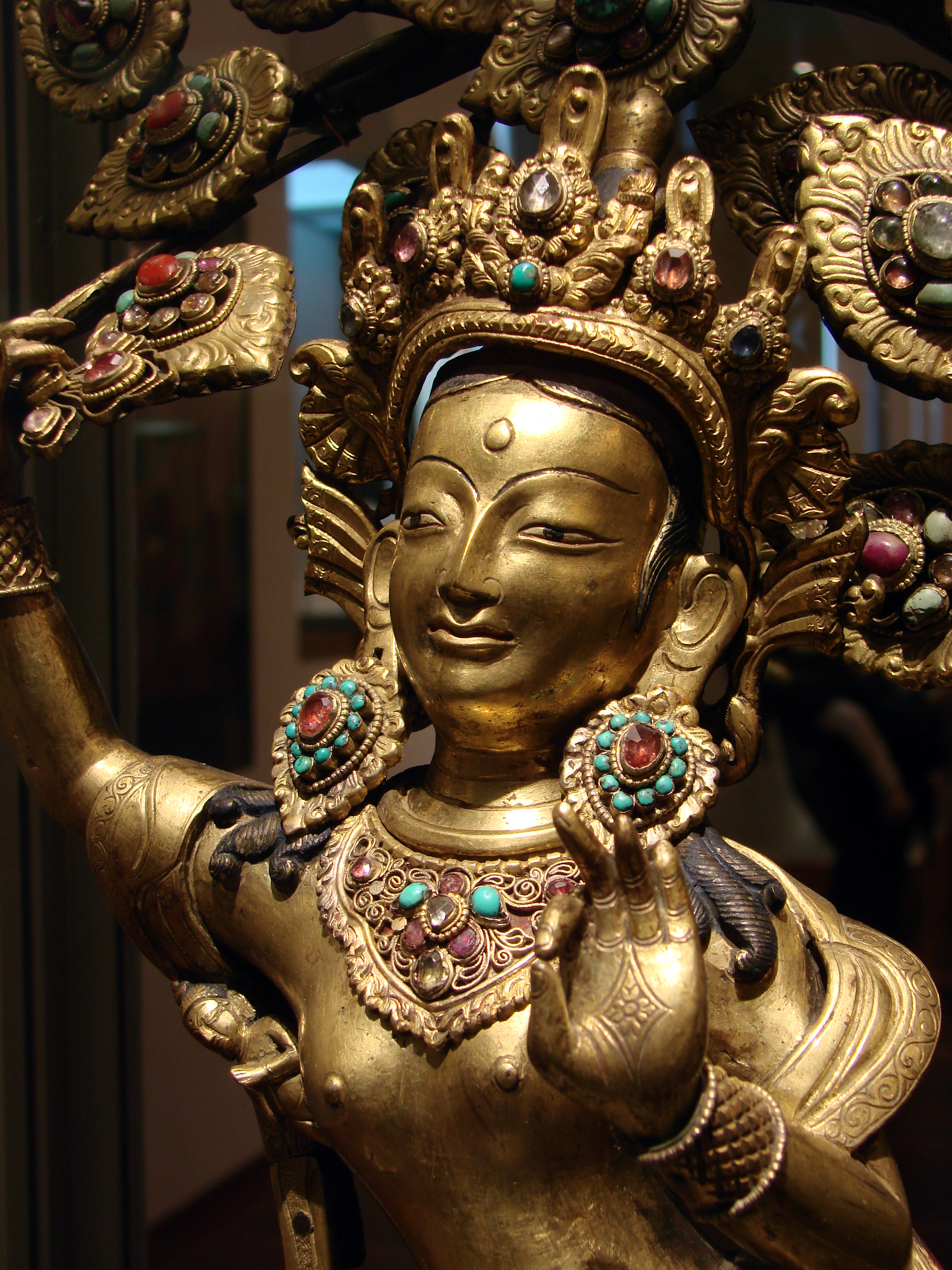 La reine Maya Devi donnant naissance au prince Siddharta, le futur bouddha Sakyamuni; Népal, début du 19ème siècle, laiton et cuivre doré et incrusté. Musée Guimet, Paris.